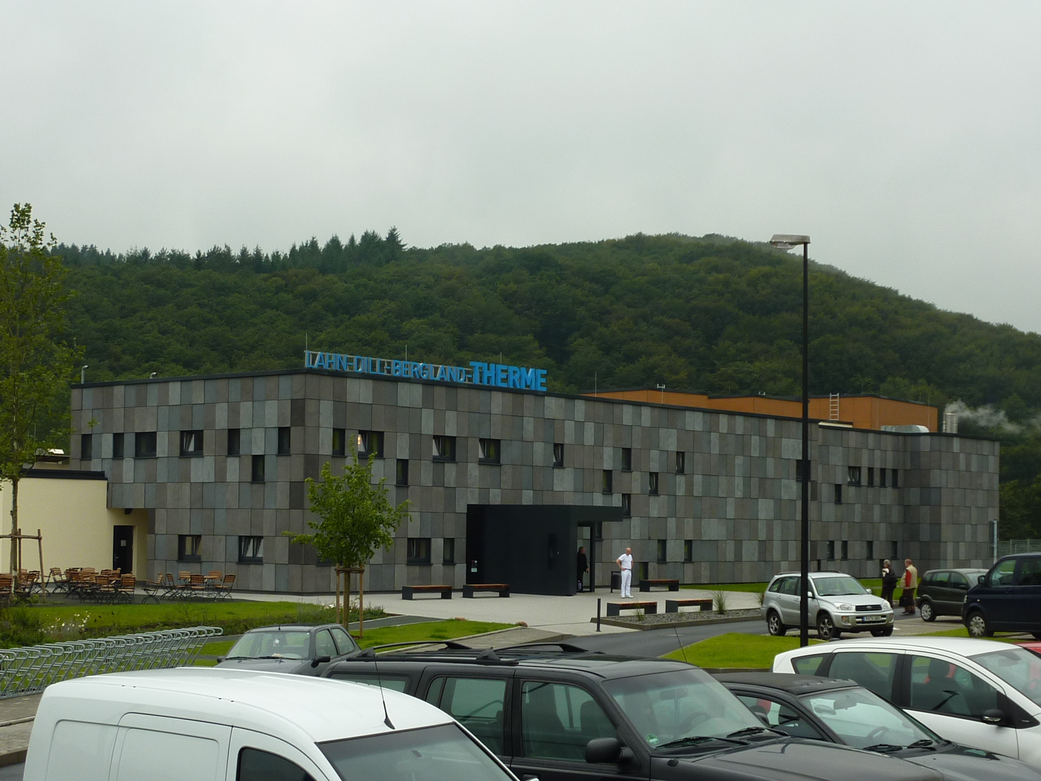 Gebäude der Lahn-Dill-Bergland-Therme in Bad Endbach von Nord-Ost gesehen